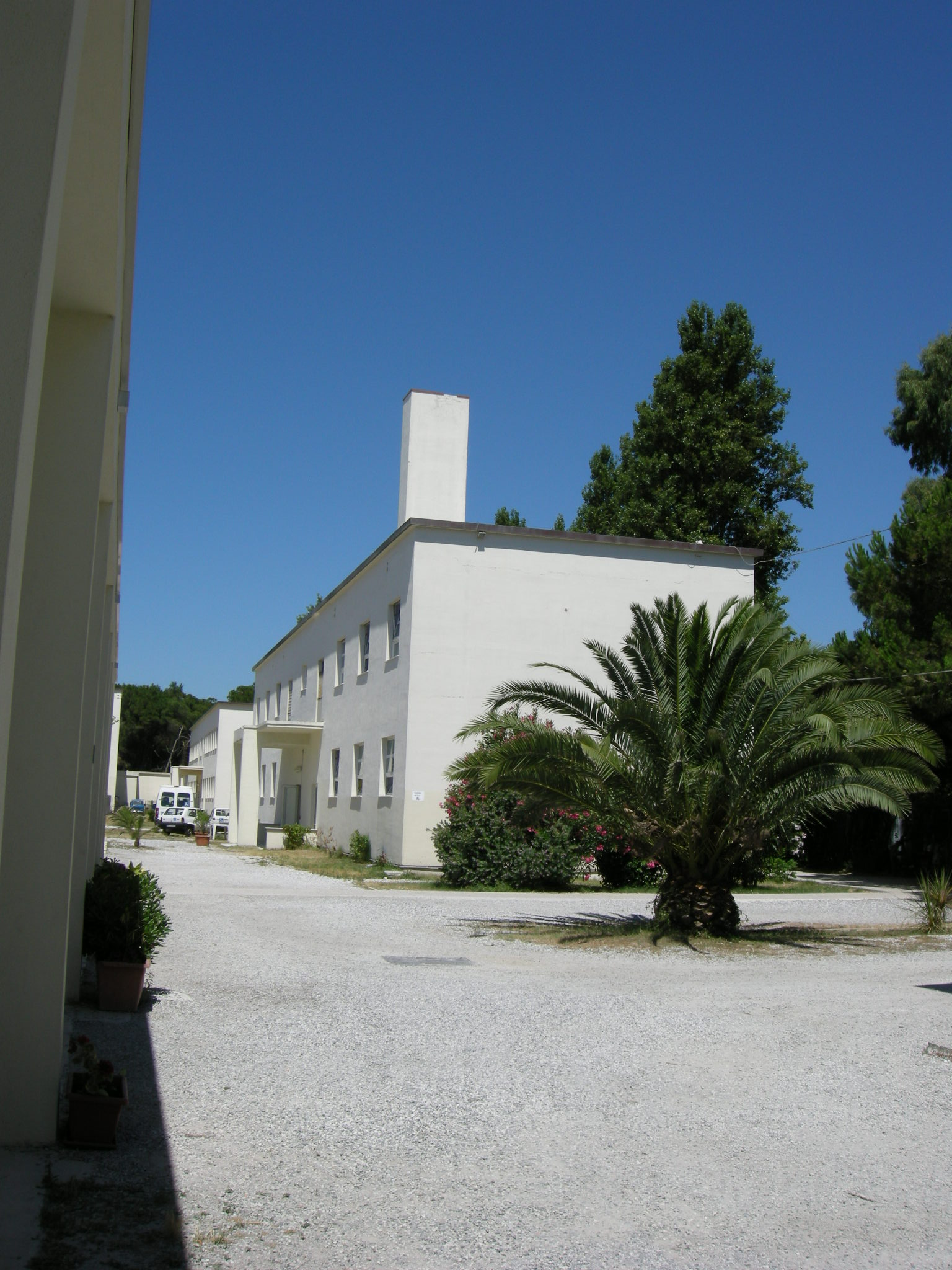 Colonia Torino